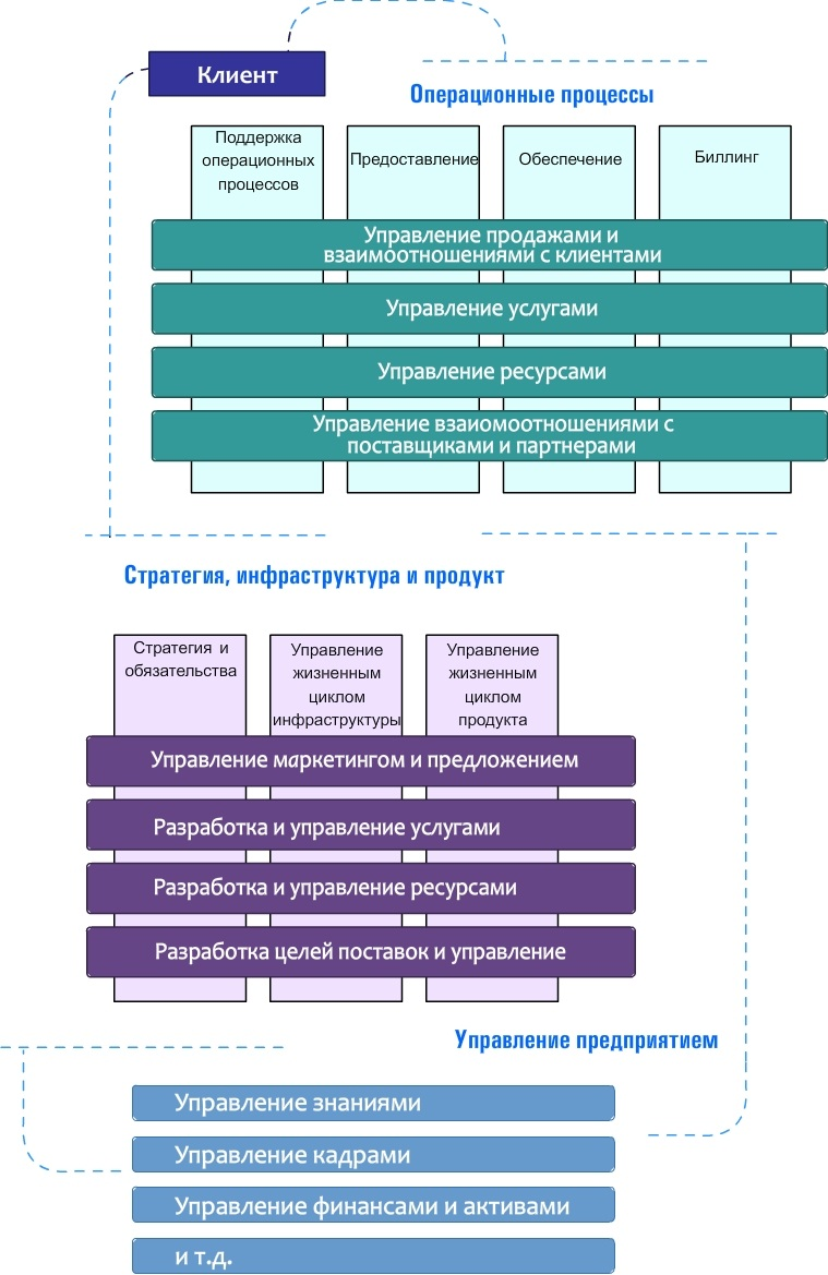 Первый уровень иерархии декомпозиции бизнес-процессов в eTOM.